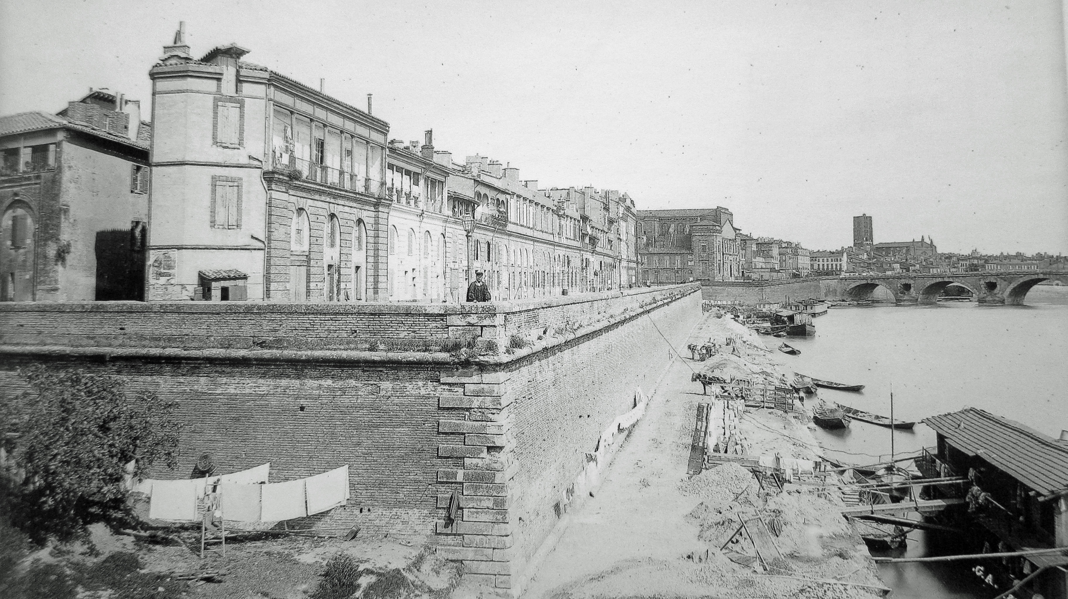 "Le Port Saint-Pierre" Inv. 009.0.78